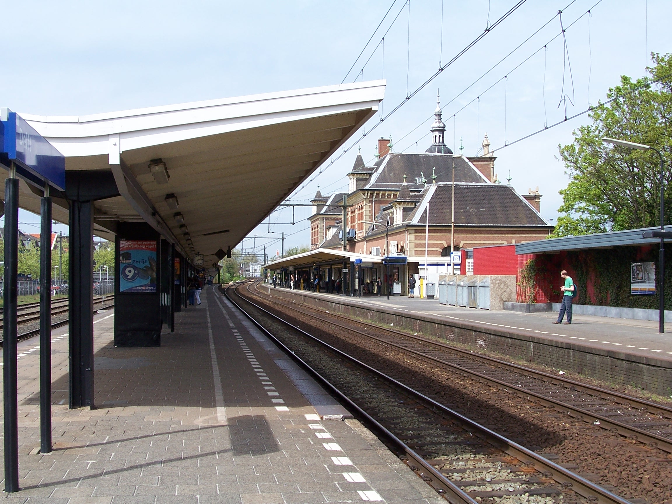 Voormalig Centraal Station Delft.